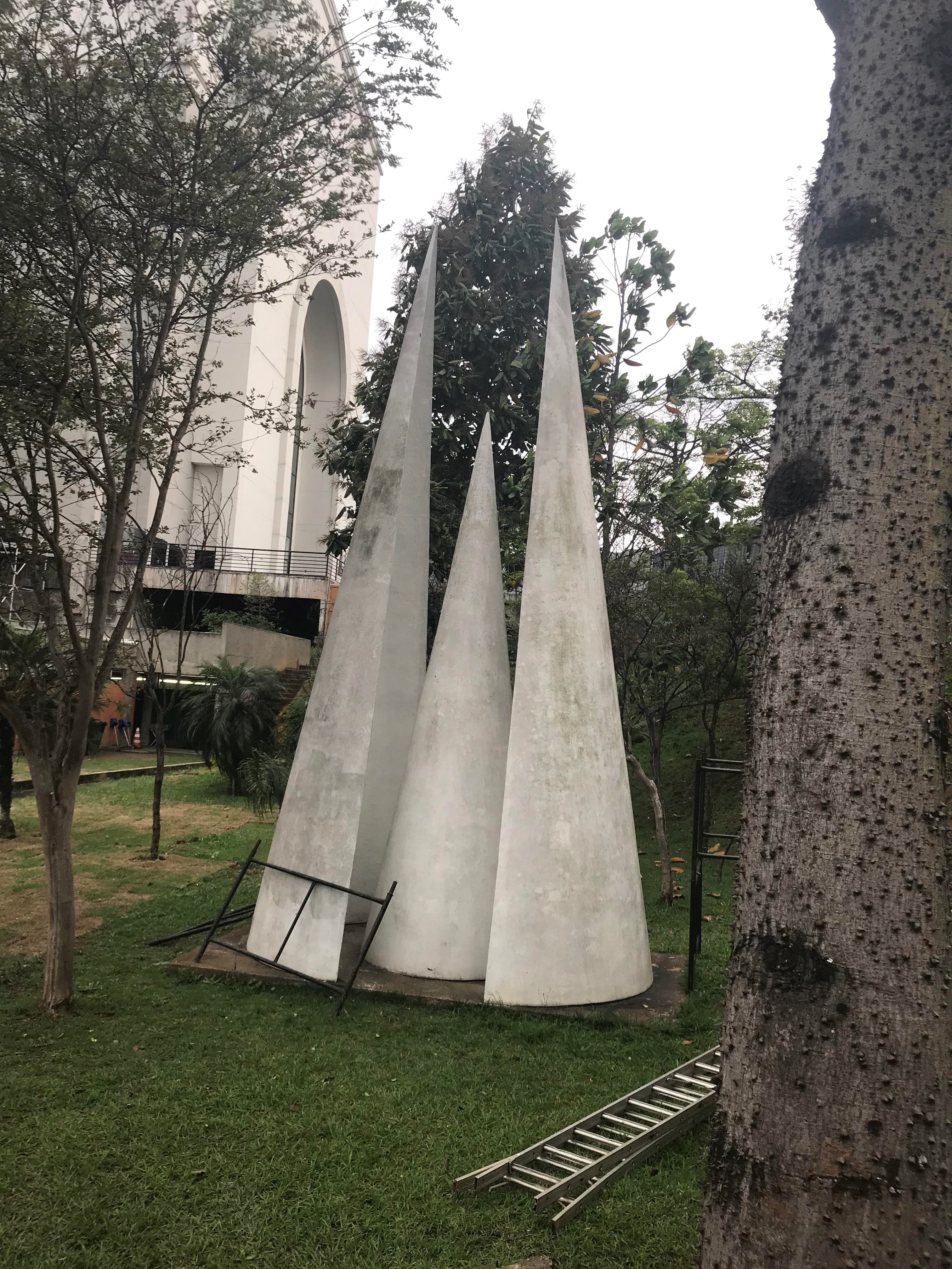 Monumento Ogô, pela artista Tatti Moreno, situado na Estação Tucuruvi, Linha 1- Azul. Material: Aço, resina de polietileno, tinta epóxi - Dimensões: 7,00m x 3,30m.